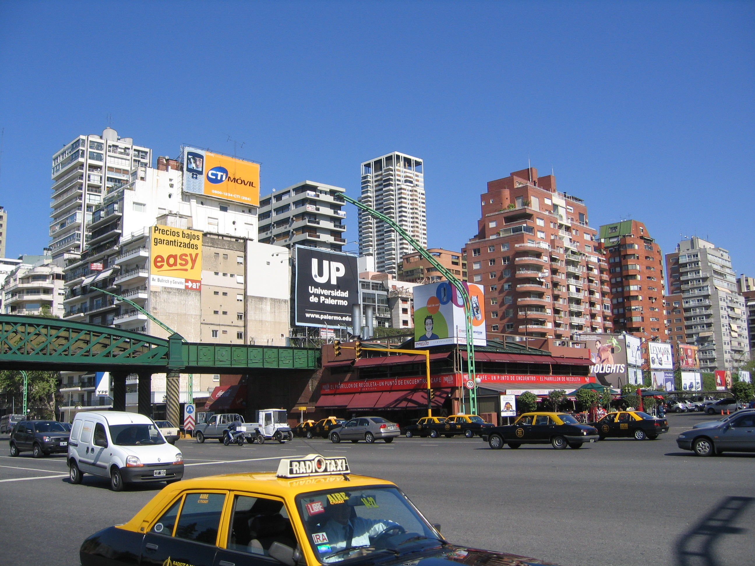 Avenida del Libertador y Bullrich, Barrio de Palermo, Ciudad de Buenos Aires, Argentina.